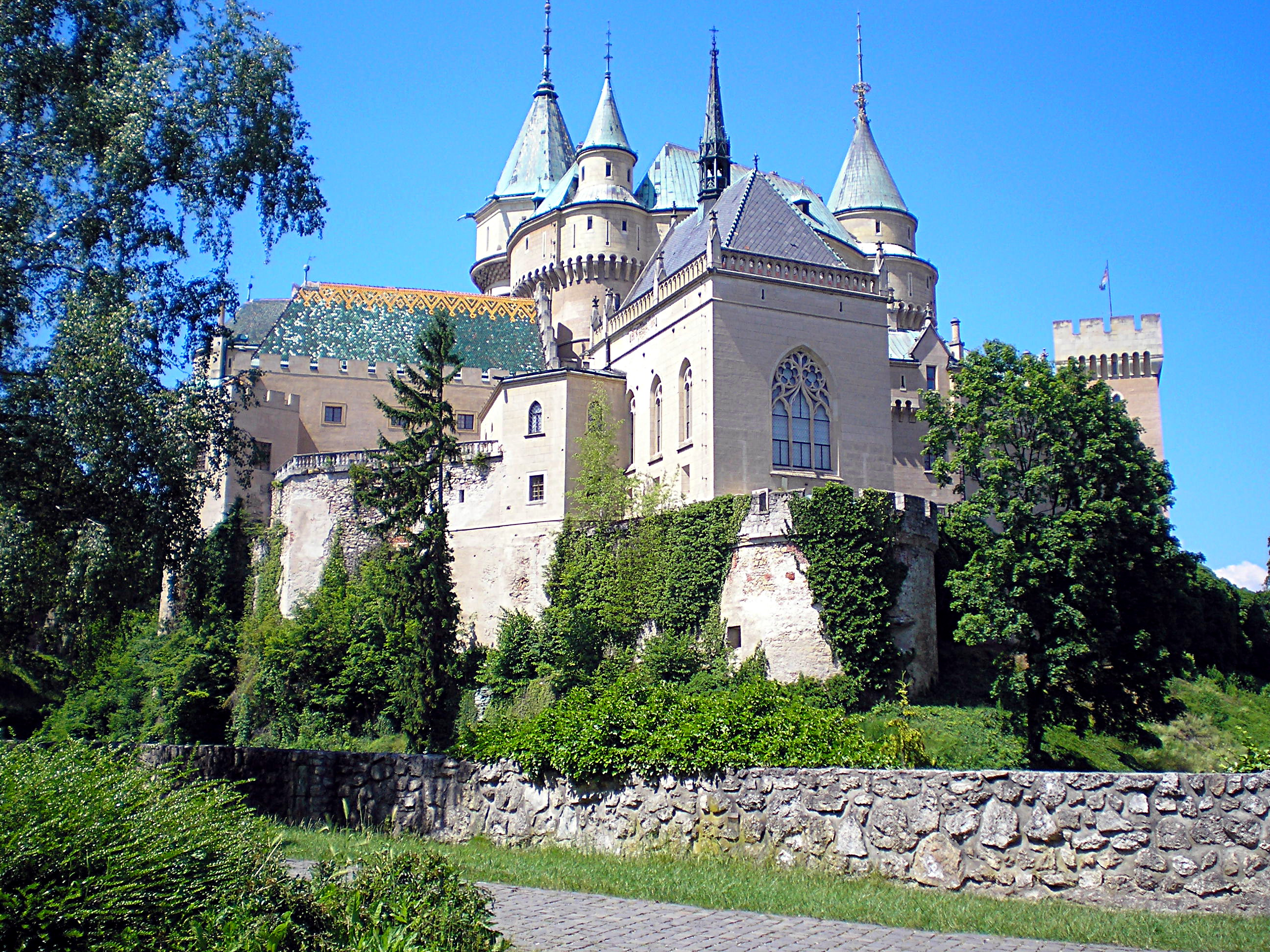 Bojnice, jún 2014